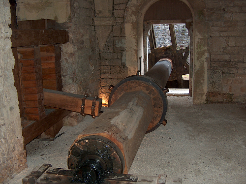 Axe du marteau hydraulique de la forge de l'abbaye de Fontenay .